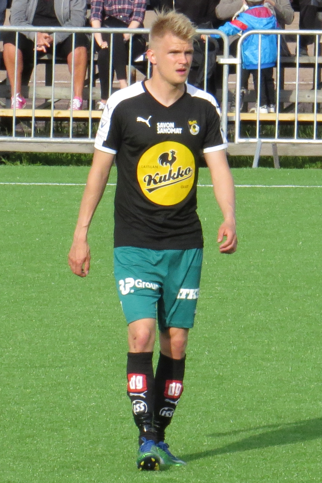 Tuomas Rannankari, suomalainen jalkapalloilija Kuopion Palloseuran joukkueessa kaudella 2015.